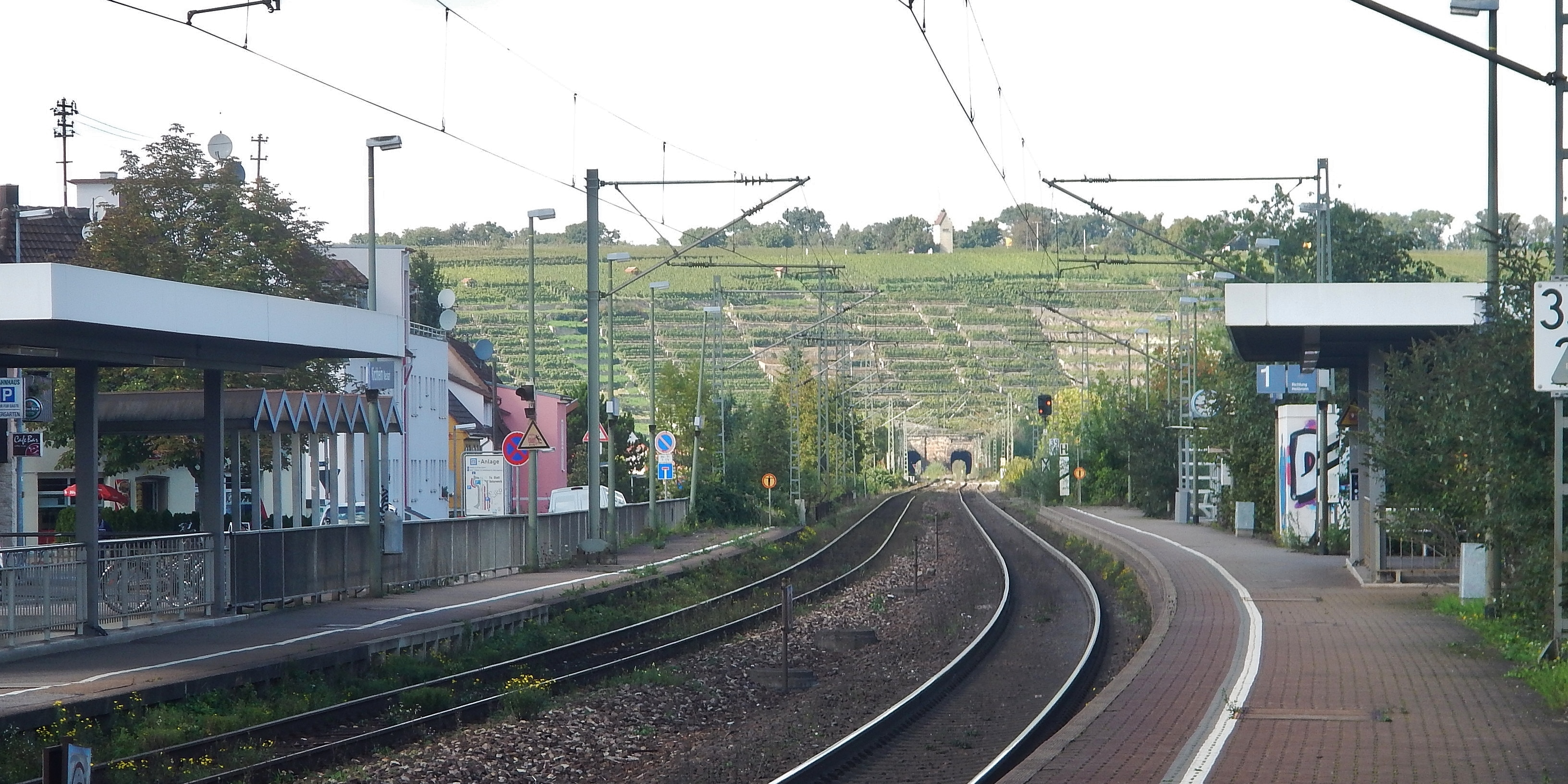 Beim 366 km langen Neckartalradweg: Bahnhof bei Kirchheim